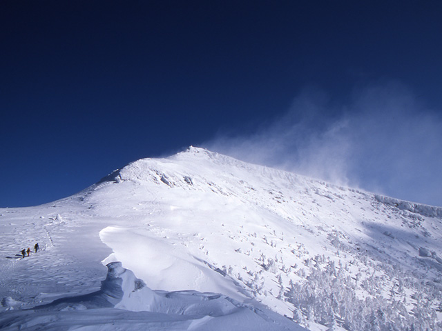 Pico Ioudake de Sierra Yatsugatake, 2760m. Foto por usario Inti-sol diciembre de 2006. 硫黄岳(2760m)、八ヶ岳連峰の一座。2006年12月、投稿者の撮影